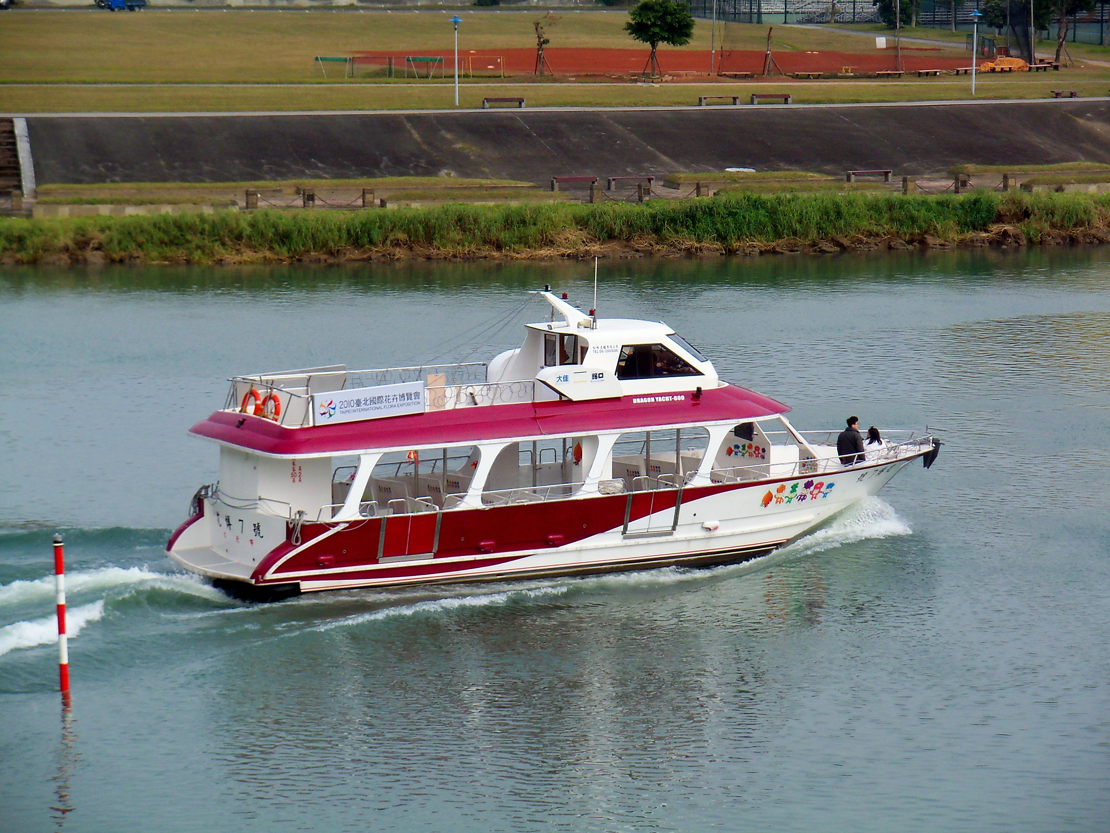 中文（台灣）: 大佳～錫口間溯基隆河而上的花博7號遊艇，攝於臺北市松山區民權大橋橋南。